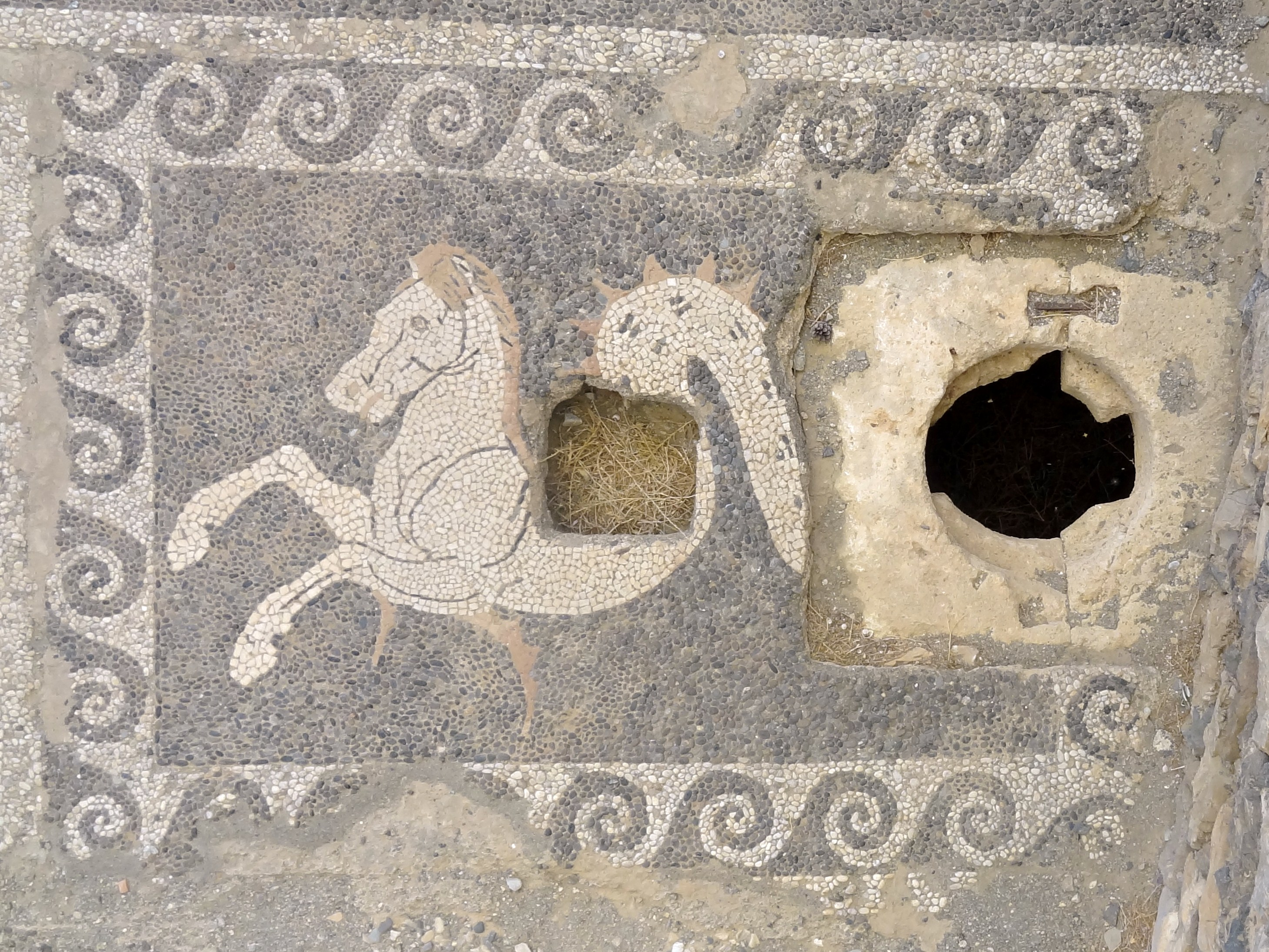 Asklepios-Heiligtum des antiken Leben (Λεβήν) in Lendas, Gemeinde Gortyna, Regionalbezirk Iraklio, Kreta, Griechenland